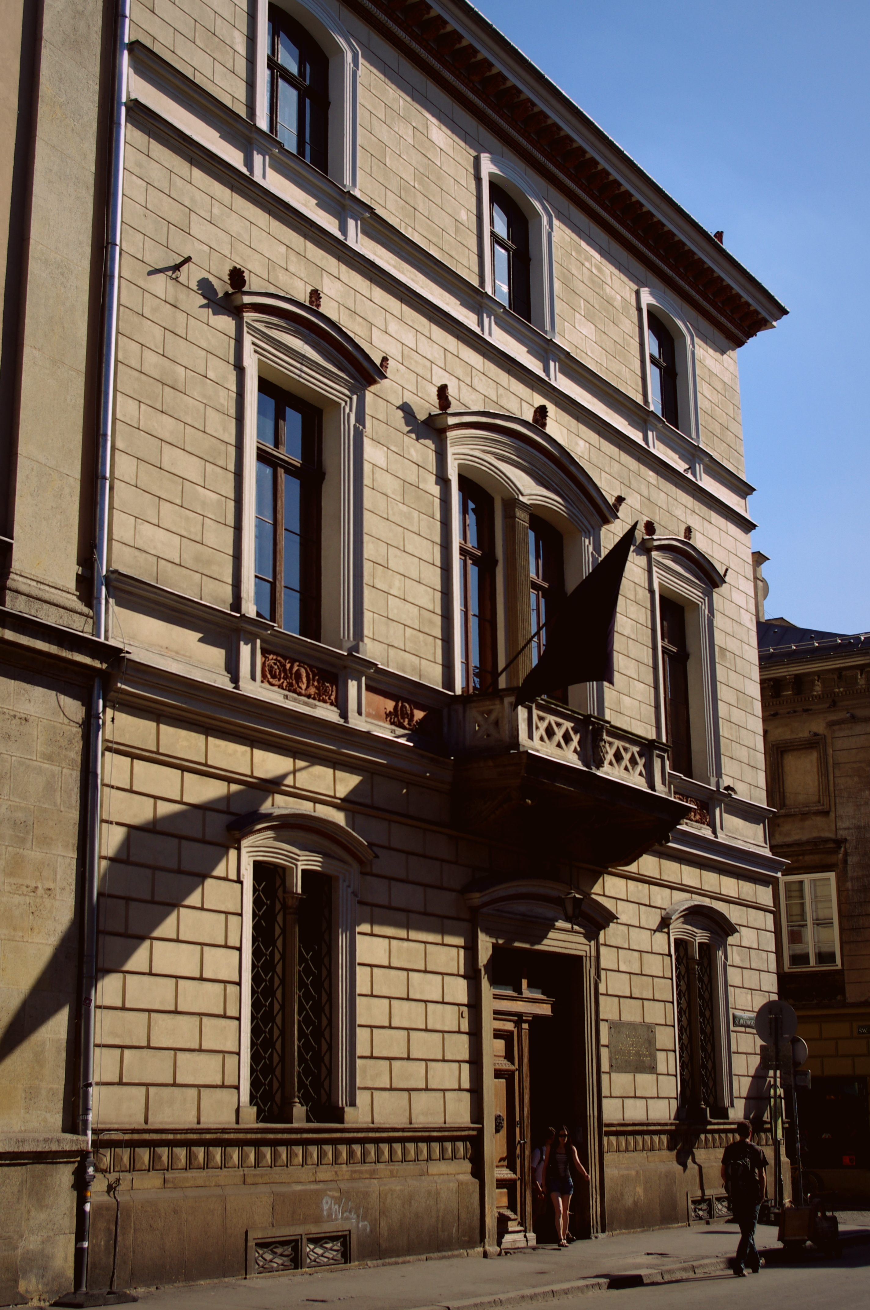 gmach Towarzystwa Naukowego Krakowskiego, ul. Sławkowska 17, Kraków